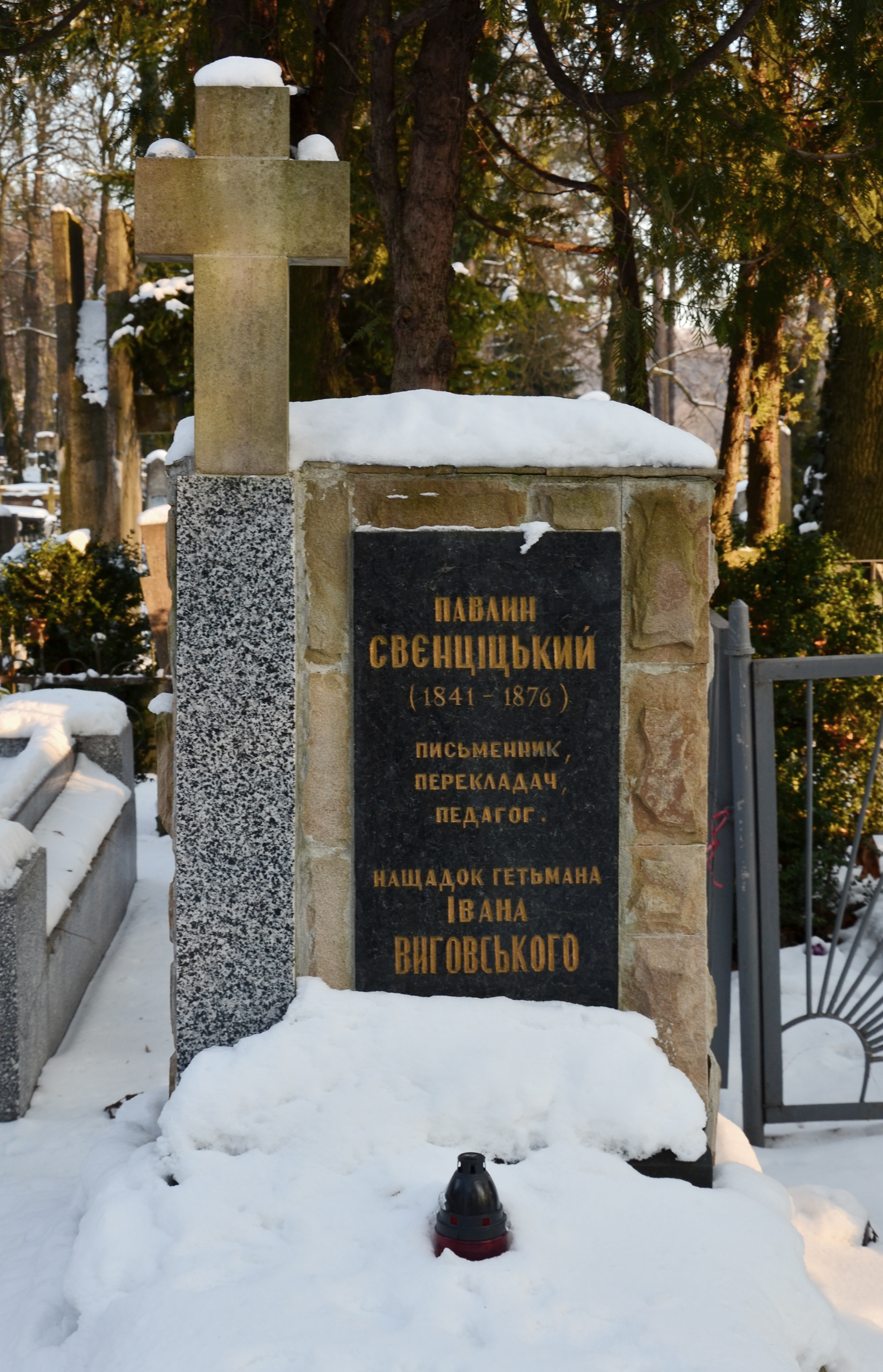 Надгробок Павлина Свєнціцького на Личаківському цвинтарі.